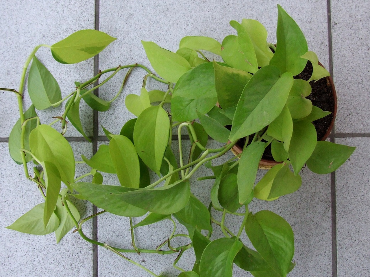 Epipremnum pinnatum